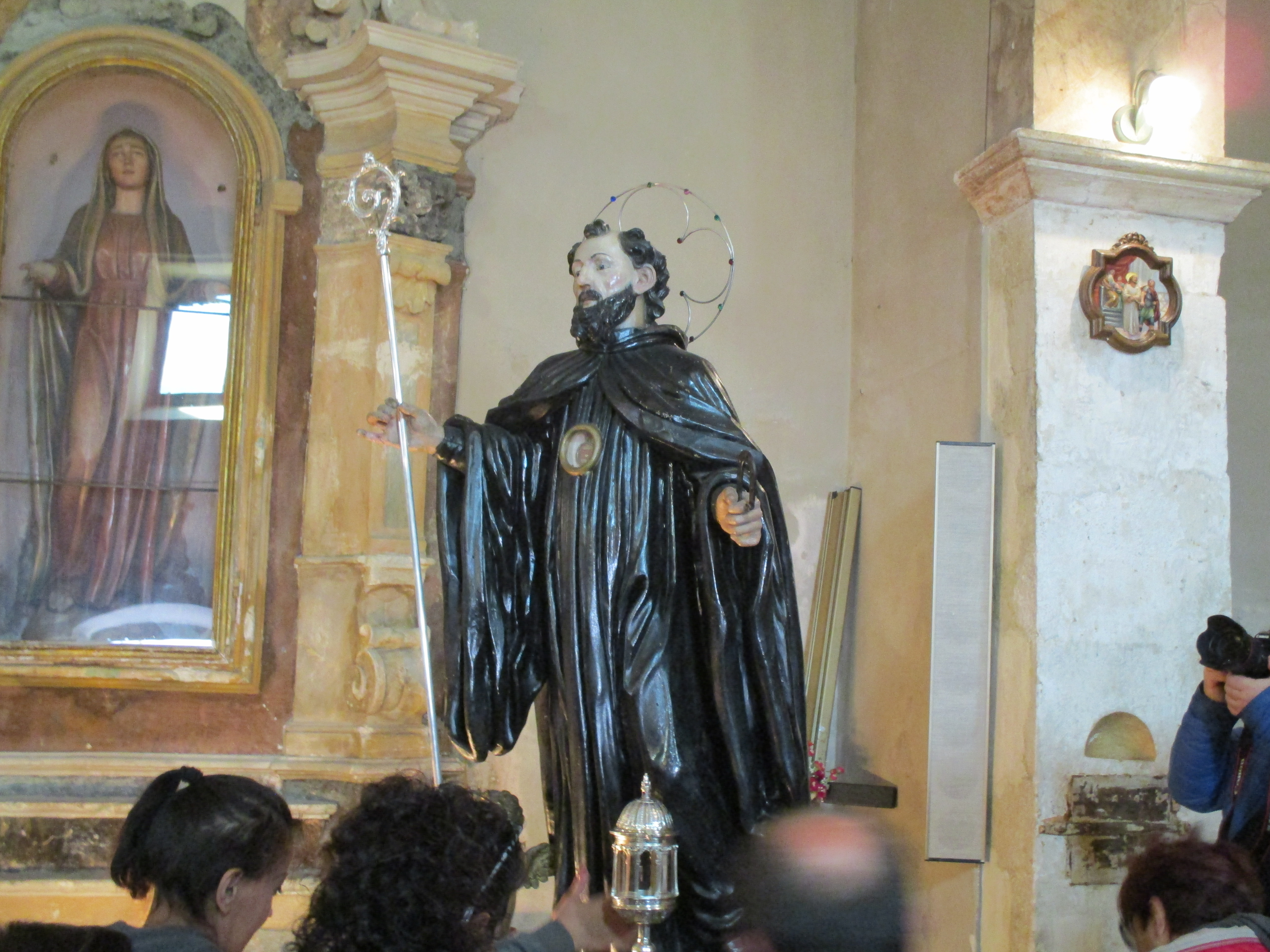 Statua di san Domenico